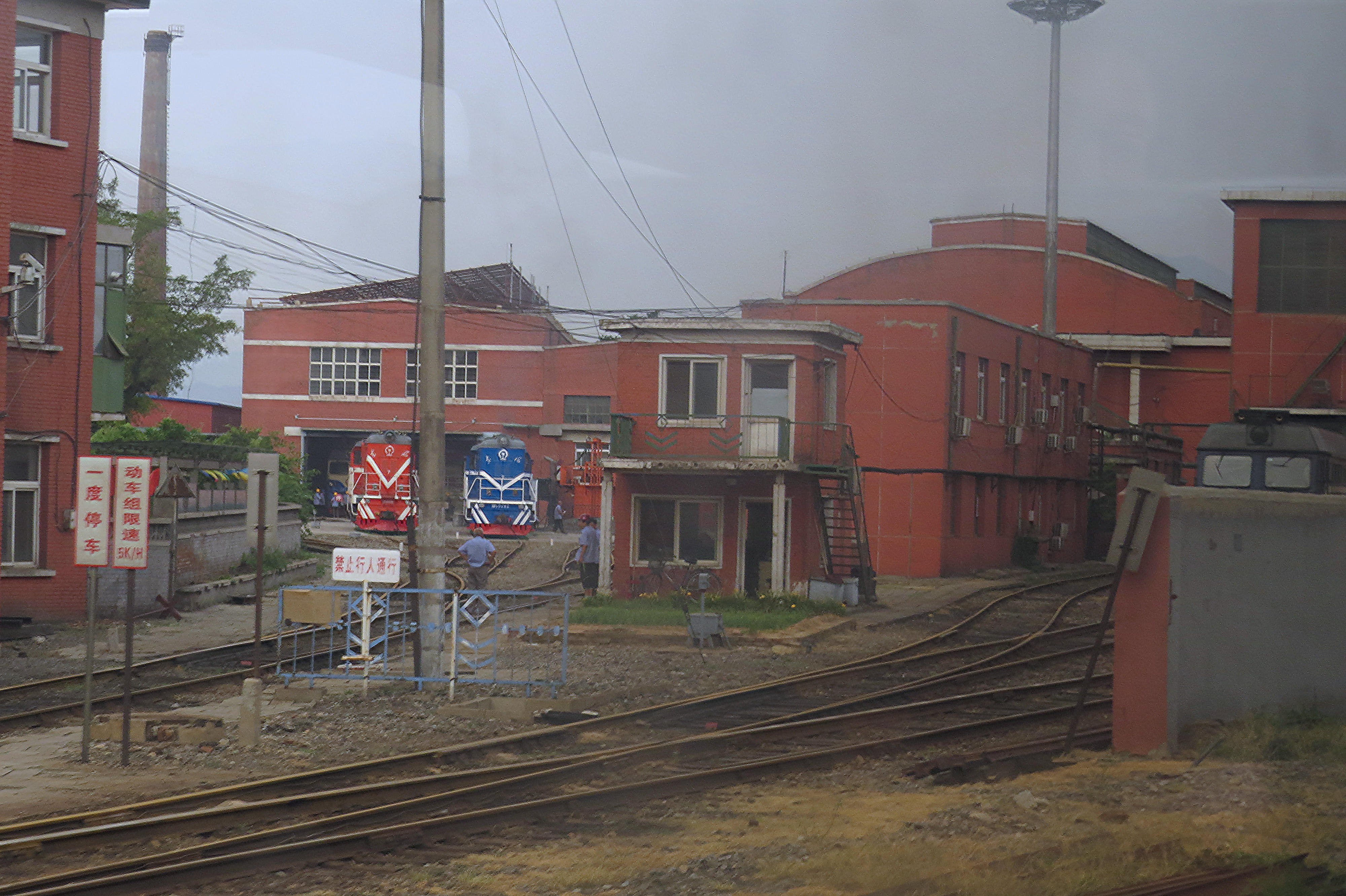 北京铁路局怀柔北机务段南口运用车间（南口机务段）